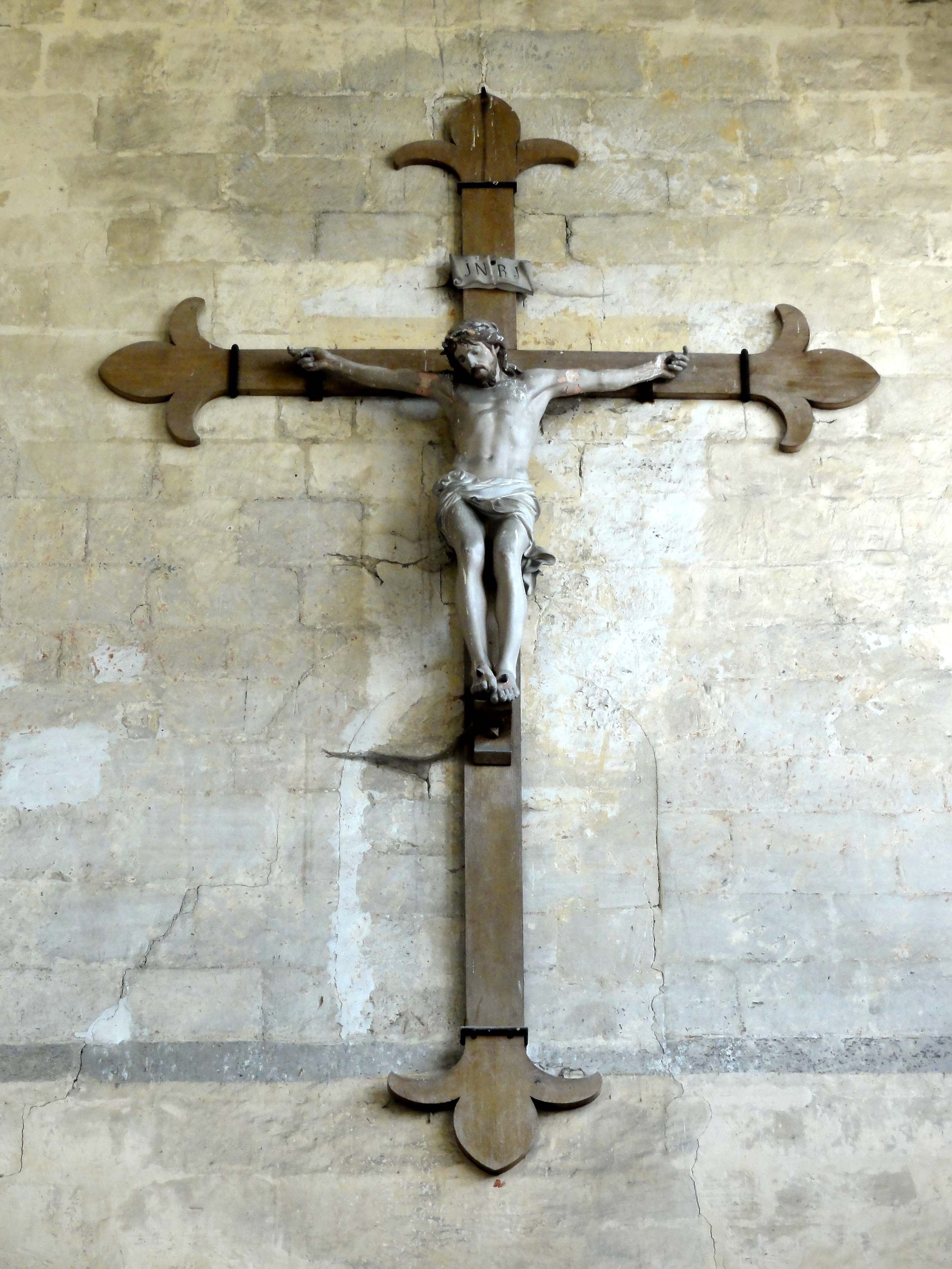 Mobilier de l'église Saint-Martin de Cires-lès-Mello (voir titre).